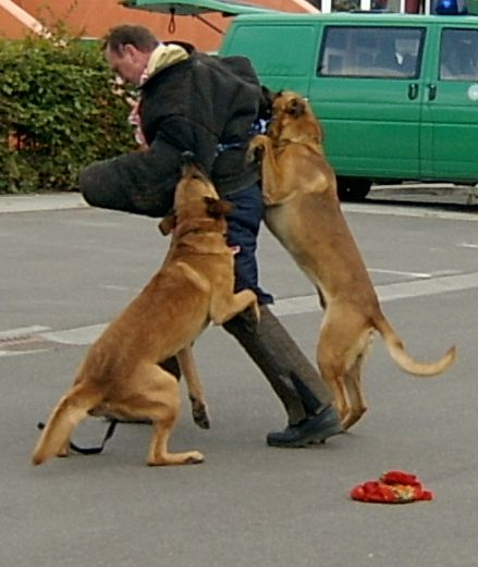 Zwei Polizeihunde beim Stellen eines (theoretischen) Täters.